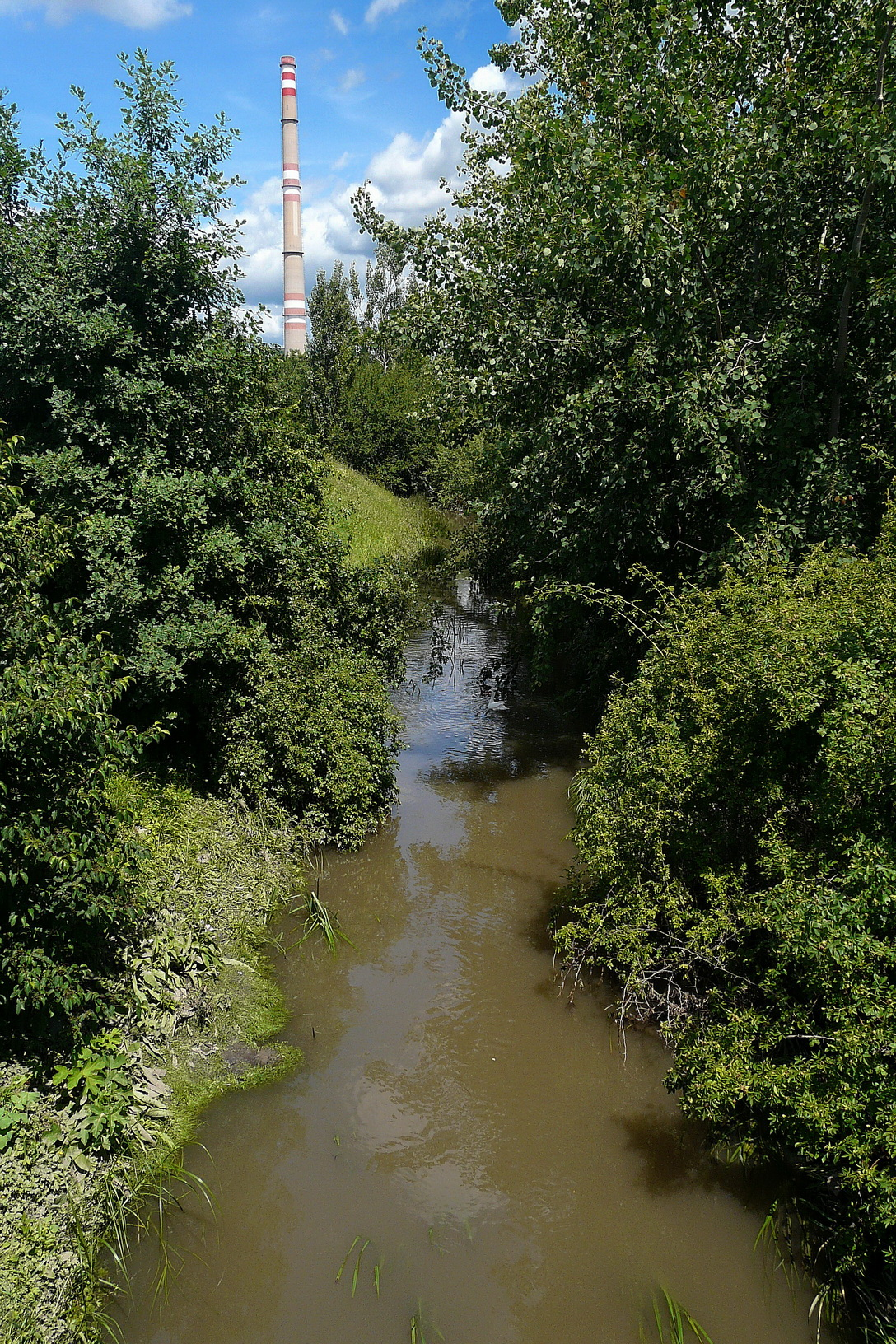 Zalužanská vodoteč za Škodou.